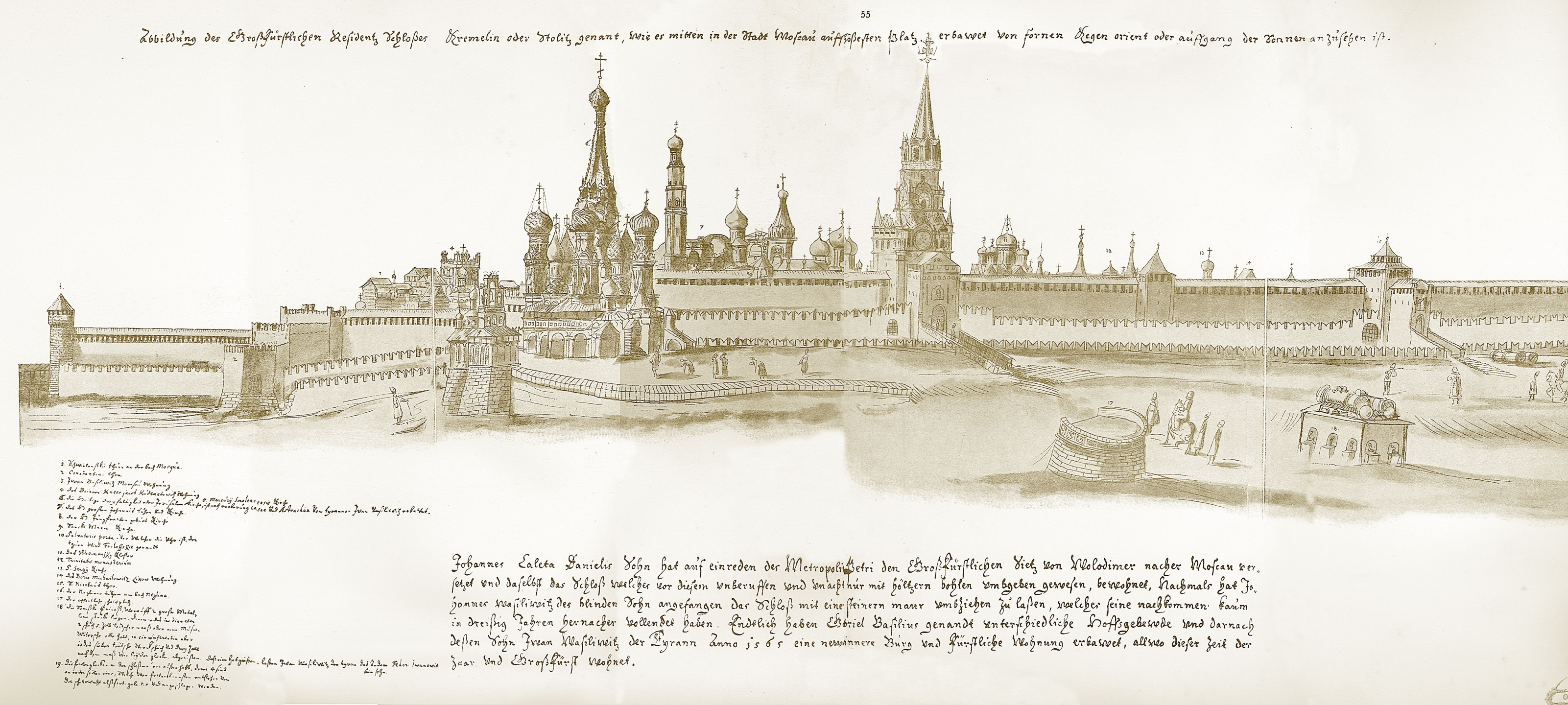 Кремль с востока. Около Лобного места на строение 2 пушки - "Царь-пушка" и "Павлин".